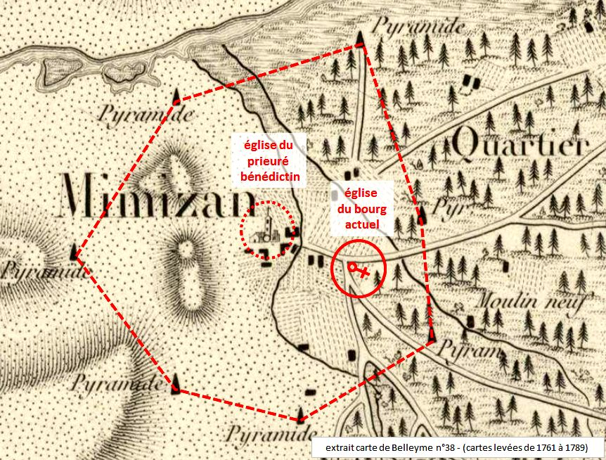 carte de Belleyme annotée